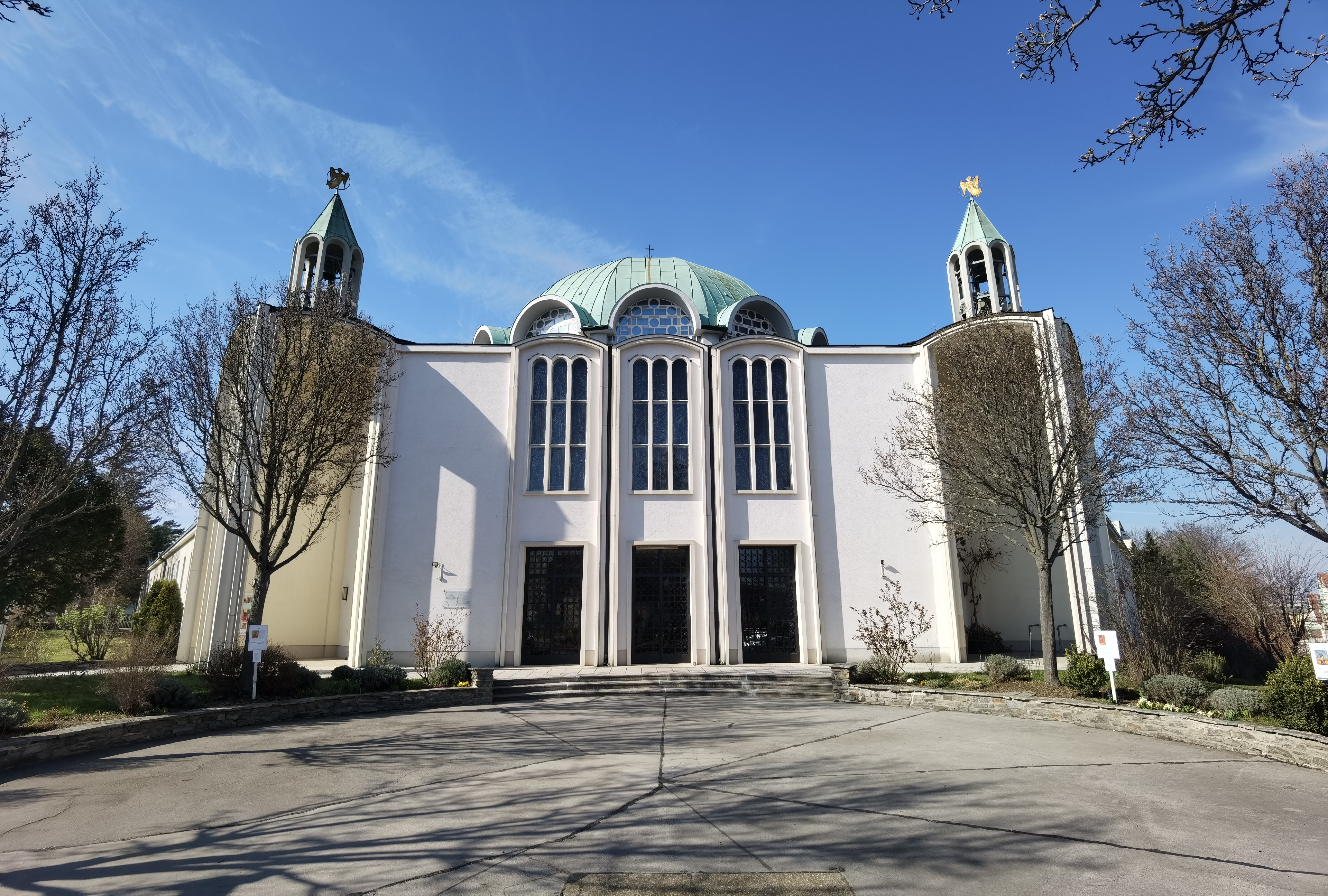 Gatterhölzlkirche (Wien-Meidling)